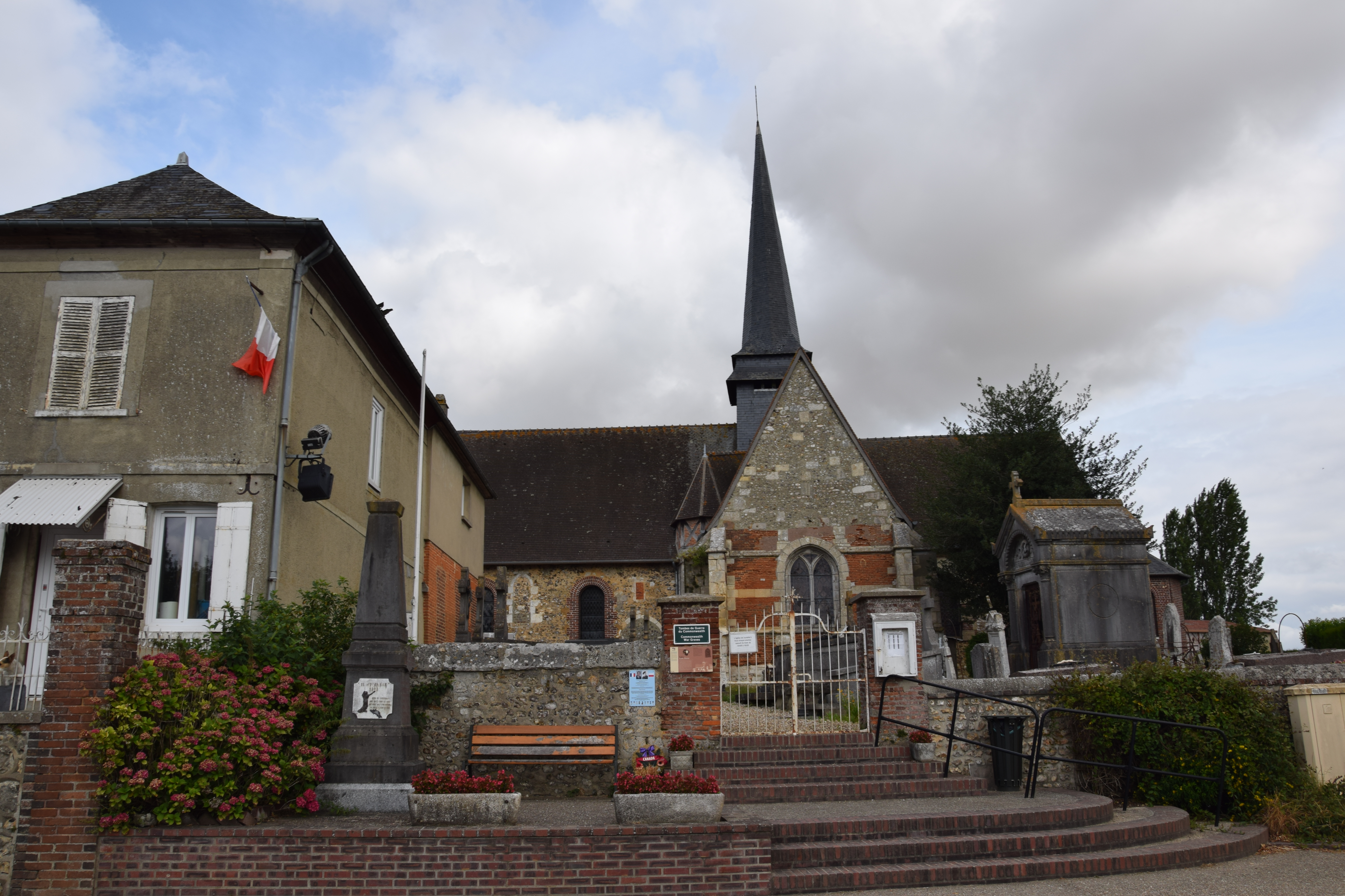 église Saint-Martin de Saussay-la-Campagne